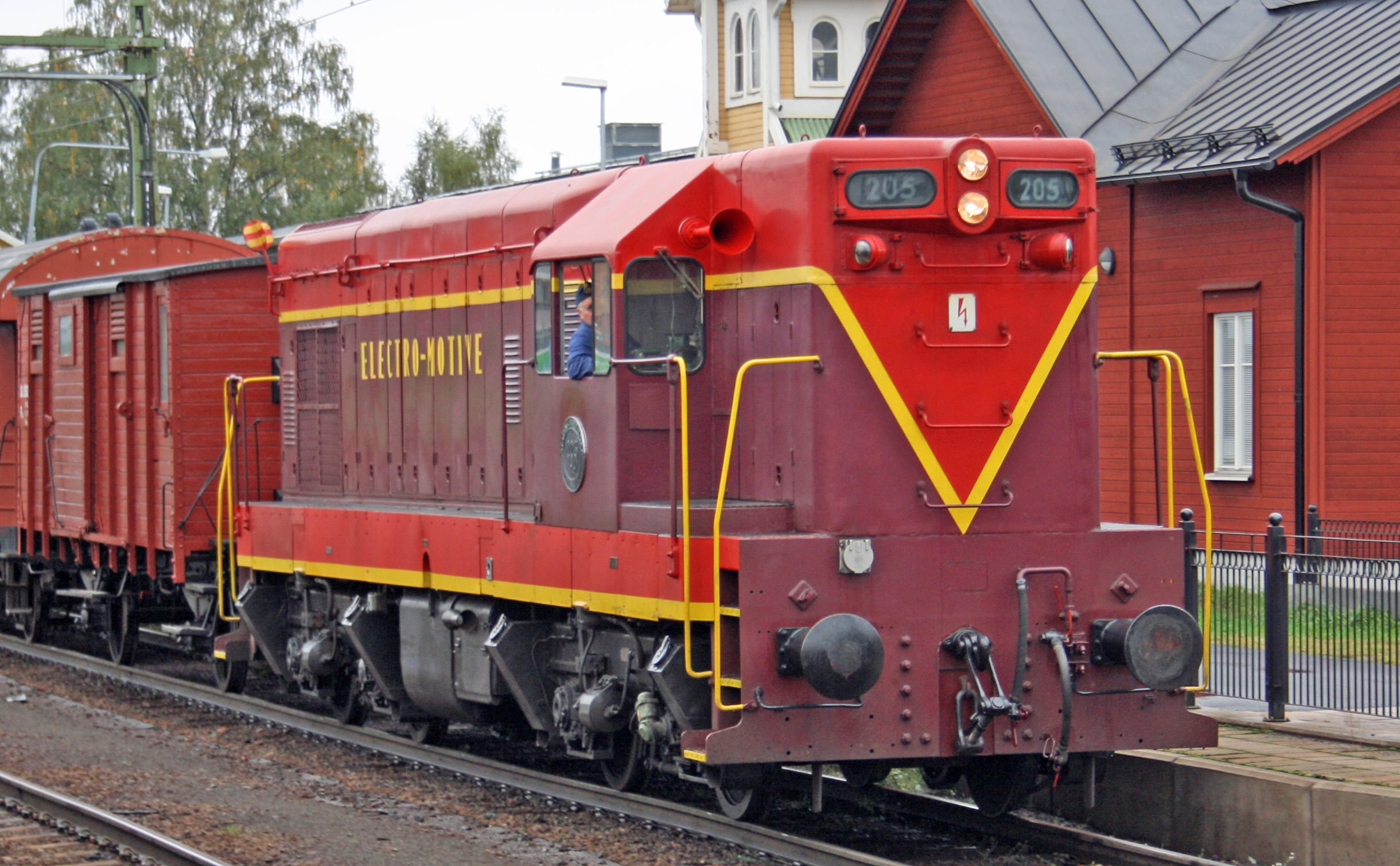 SJ lok T42, målat i den färgsättning loket hade vid provkörningarna i Sverige. Boden, 1 september 2012.